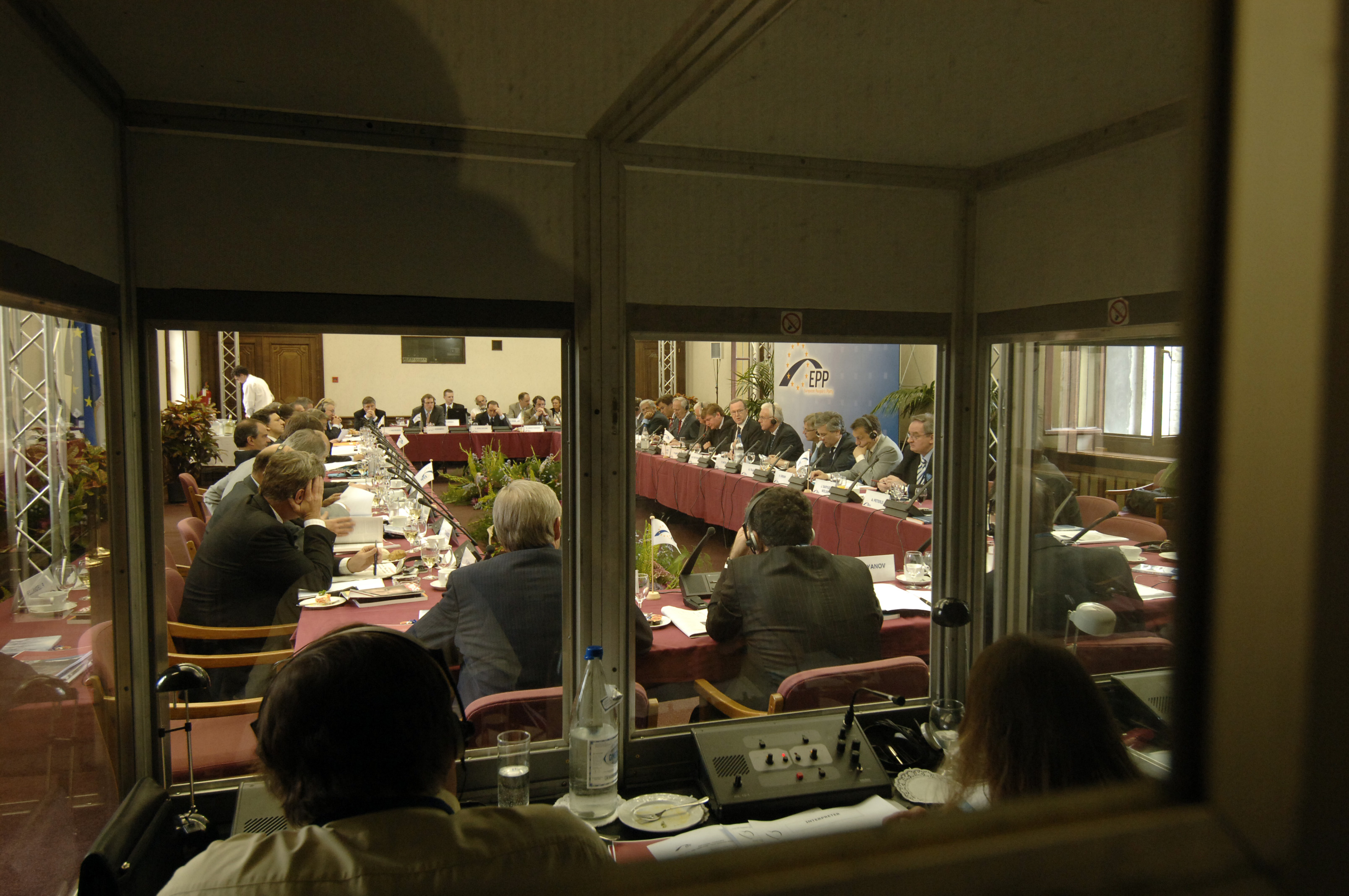 EPP Sumiit 15 May 2006